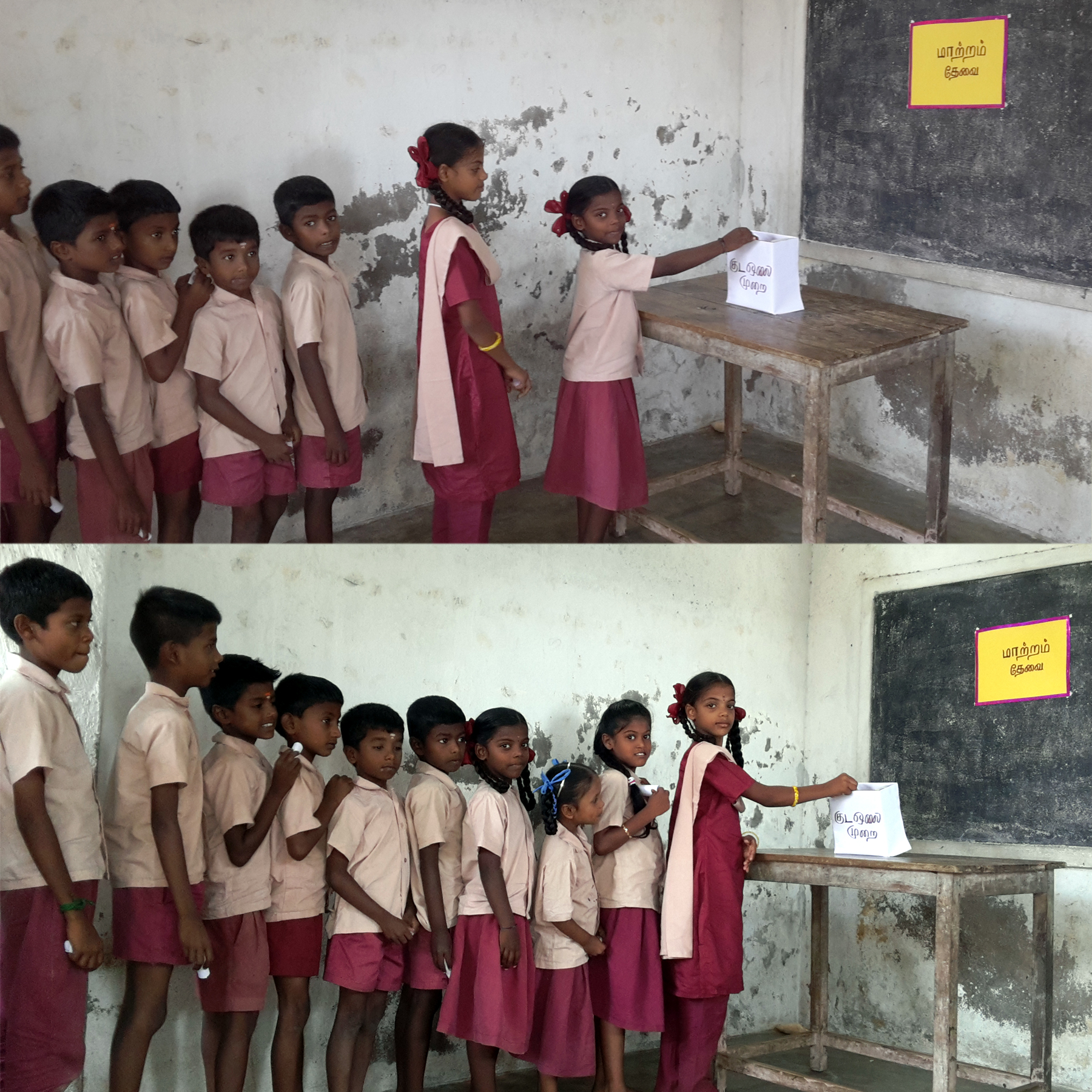 குழந்தை உரிமைகள் பற்றி எடுத்து உரைத்தல்